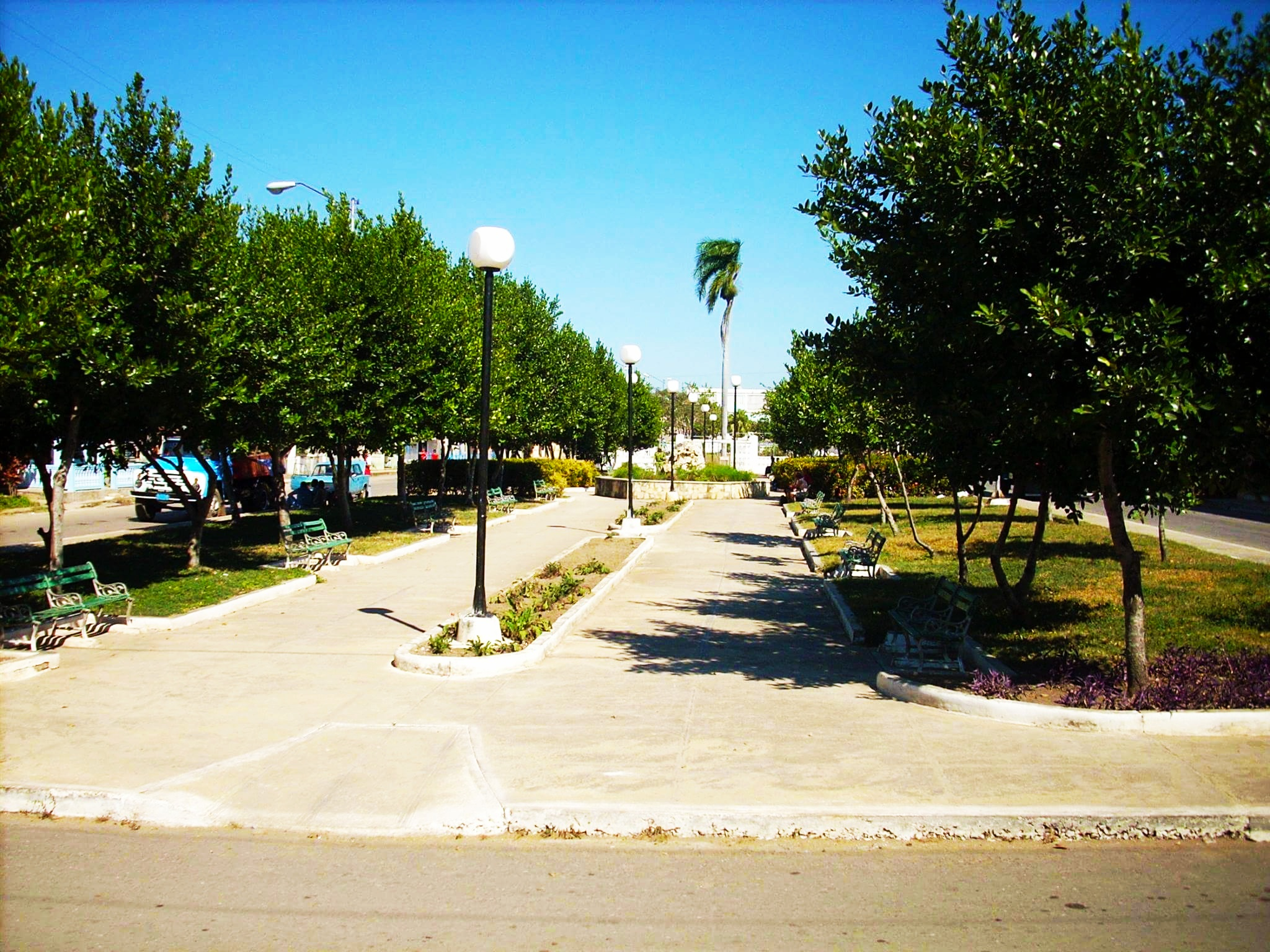 Prado de Rodas. A continuación se observa el parque infantil y más al fondo la Escuela Primaria Raúl Suárez